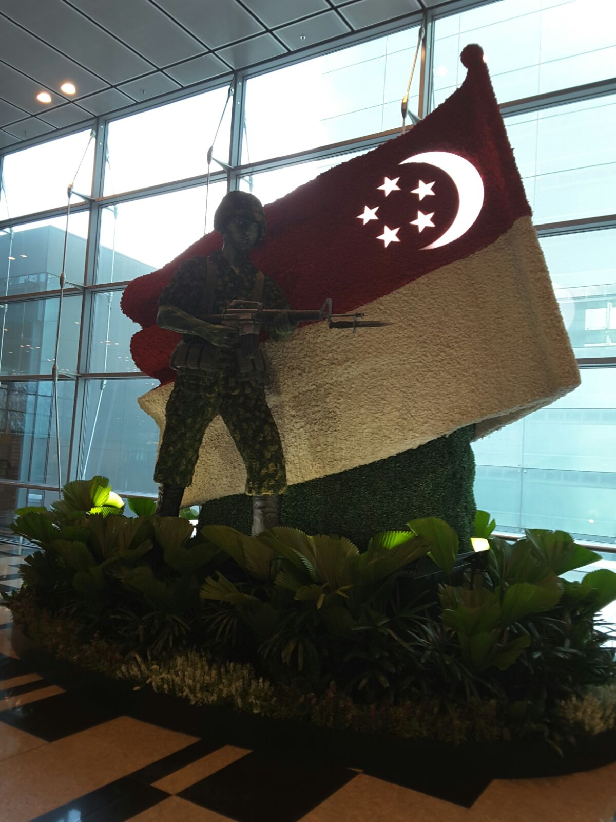 NS50 di Lapangan Terbang Changi.